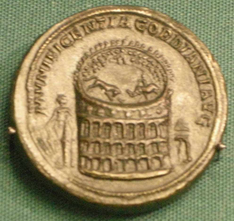 Monnaie de Gordien III réf. Cohen 165 ; avers (non figure) IMP. GORDIANUS PUIS FELIX AUG ; revers : MUNIFICIENTIA GORDIANI AUG